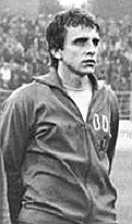 Title: Halle, DDR - Island 3:1, Mannschaftsfoto DDR Factual corrections and alternative descriptions are encouraged separately from the original description. Additionally errors can be reported at this page to inform the Bundesarchiv. Original historic description: ADN-ZB-Mittelstädt-20.10.78-zin-Halle: Fußball-Europameisterschaft. Die DDR-Fußball-Nationalmannschaft bestritt am 4.10.78 ihr erstes Europameisterschafts-Qualifikationsspiel der Gruppe 4 gegen Island und besiegte die Nordländer mit 3:1 (2:1). In dieser Aufstellung begann die DDR-Elf das Spiel: V.l.n.r. Mannschaftskapitän Hans-Jürgen Dörner, Torhüter Jürgen Croy, Lutz Eigendorf, Lothar Hause, Hans-Jürgen Riediger, Gerd Weber, Reinhard Häfner, Konrad Weise, Jürgen Pommerenke, Werner Peter und Martin Hoffmann.